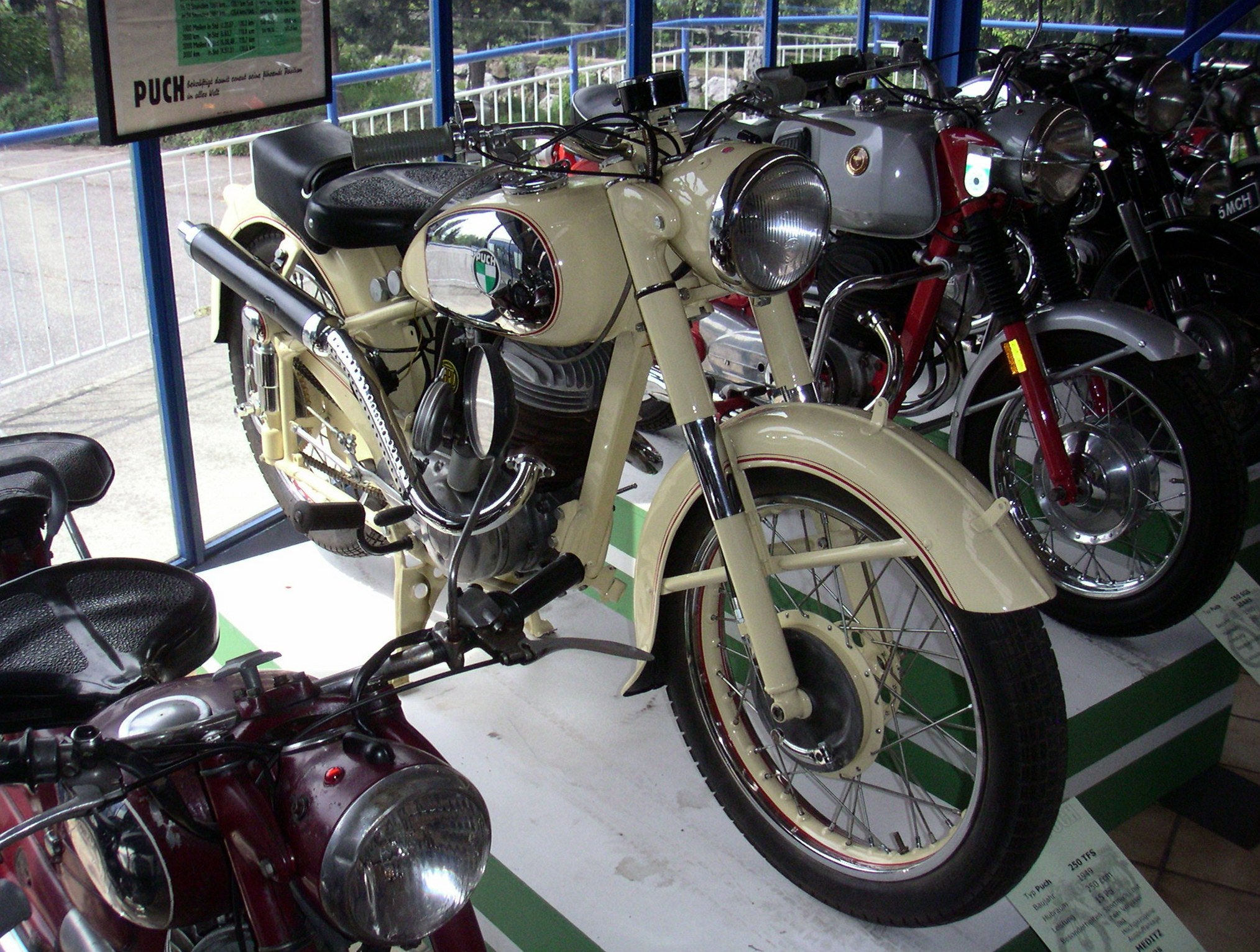 Puch 250 TFS, Motorrad, Baujahr 1949, ausgestellt im Johann Puch Museum Graz, Mai 2004